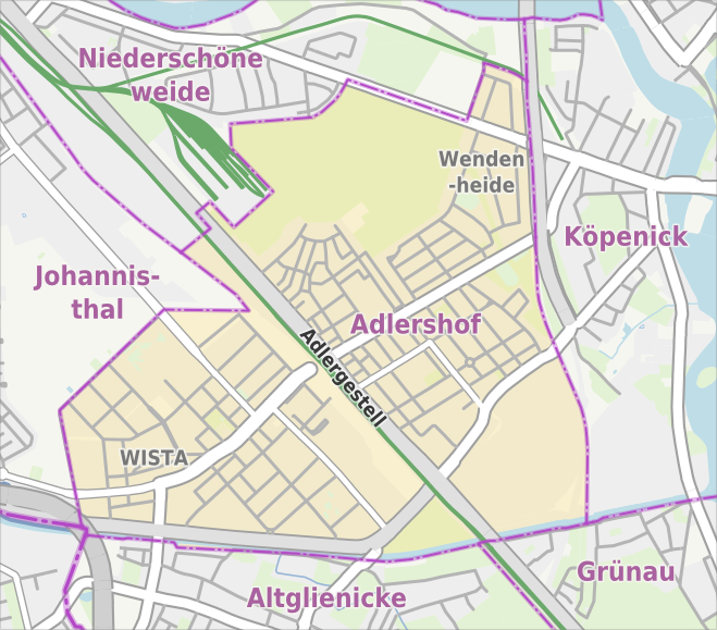 Übersichtskarte der Straßen und Ortslagen in Berlin-Adlershof